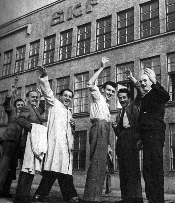 Italienska invandrare i Göteborg